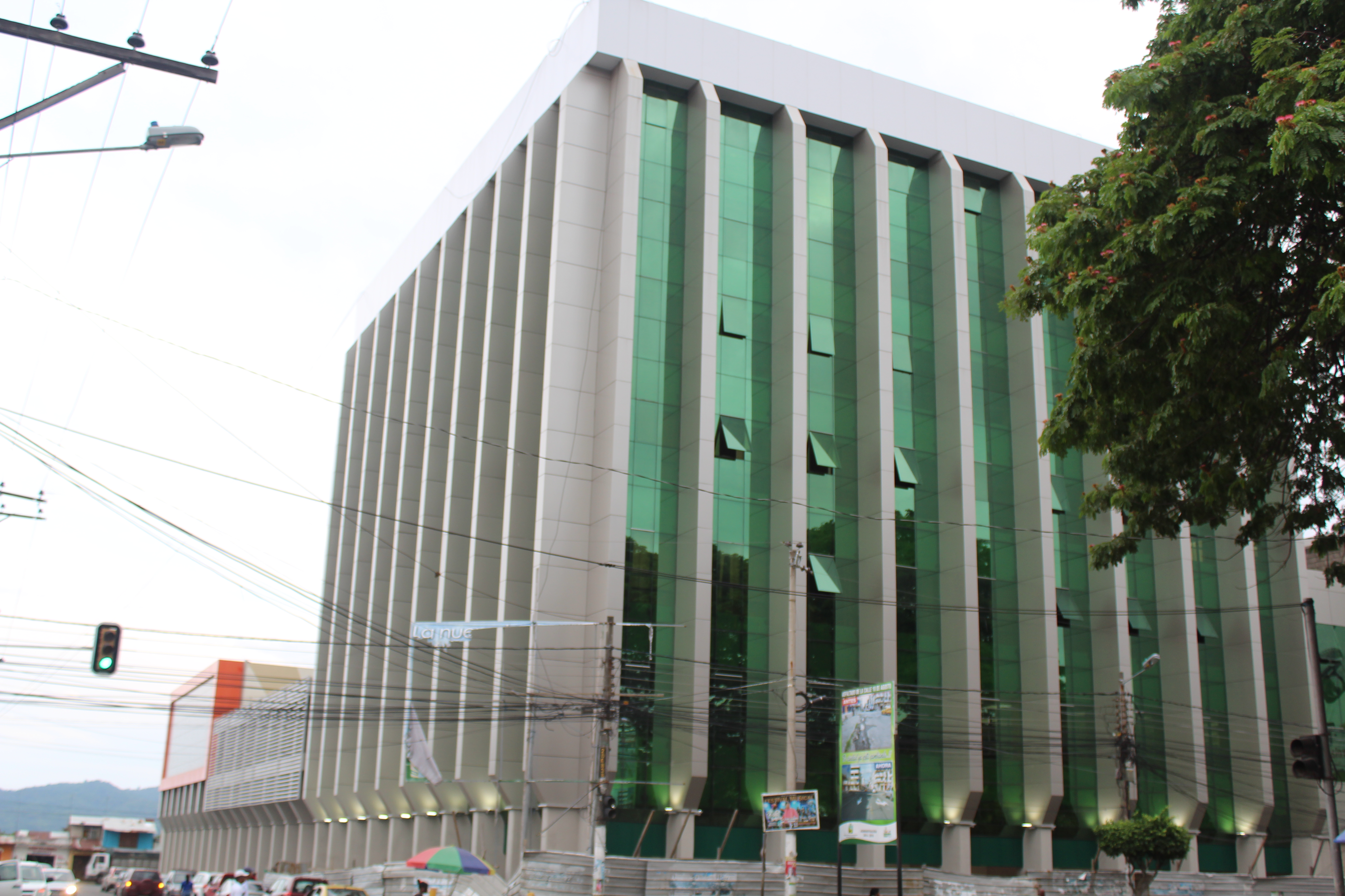 Edificio institucional de la Prefectura Provincial de Esmeraldas.